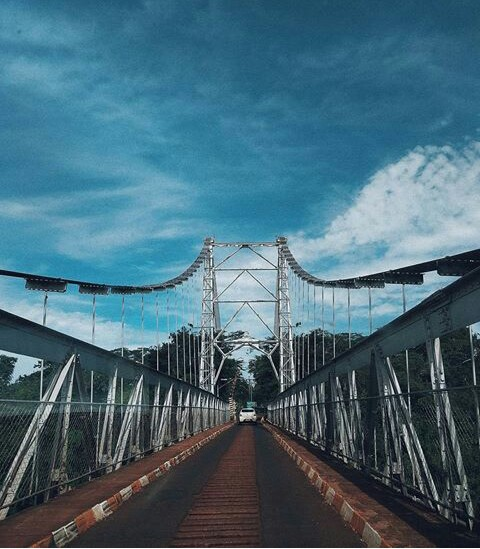 Ponte Affonso Pena, em Itumbiara (GO).